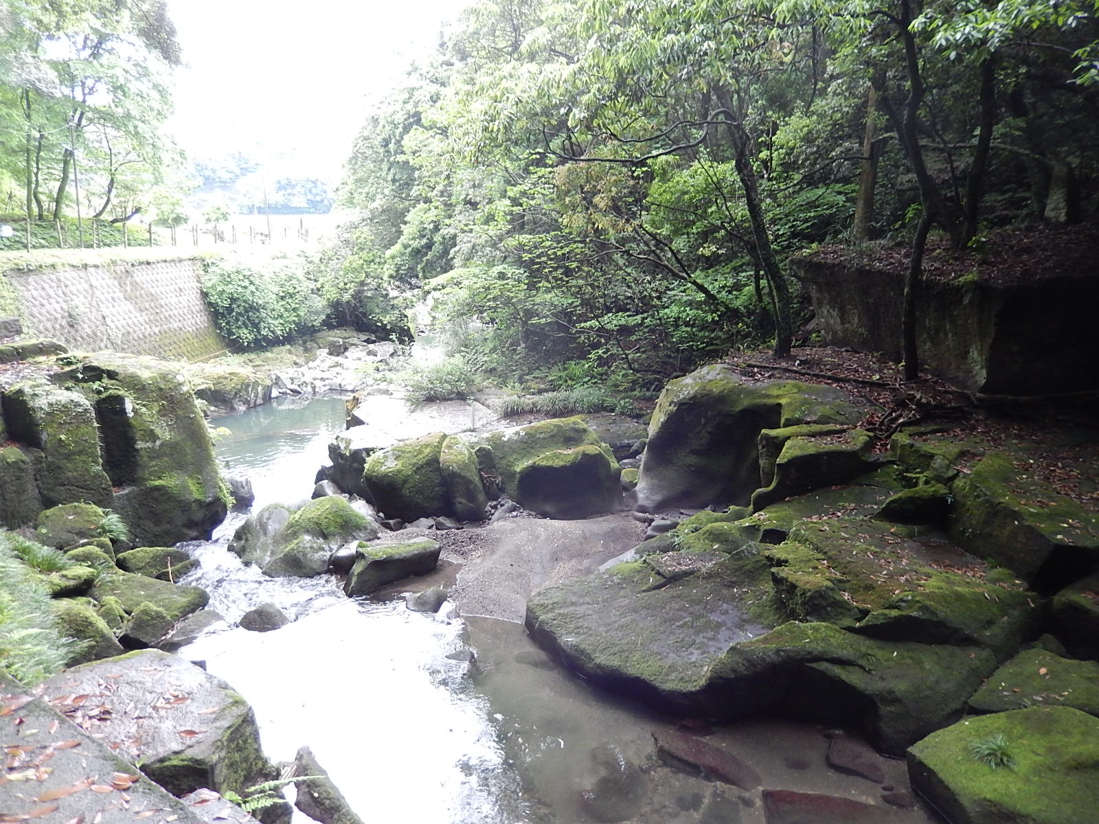 世界遺産推薦物件「明治日本の産業革命遺産群」構成資産、旧集成館・関吉の疎水溝（分水嶺）